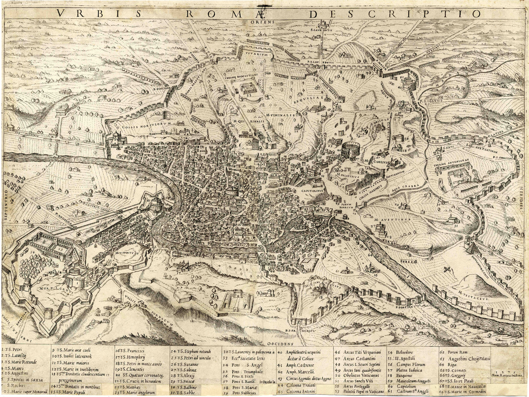 Cartaro, Mario: Urbis Romae descriptio; Kupferstich, 1575